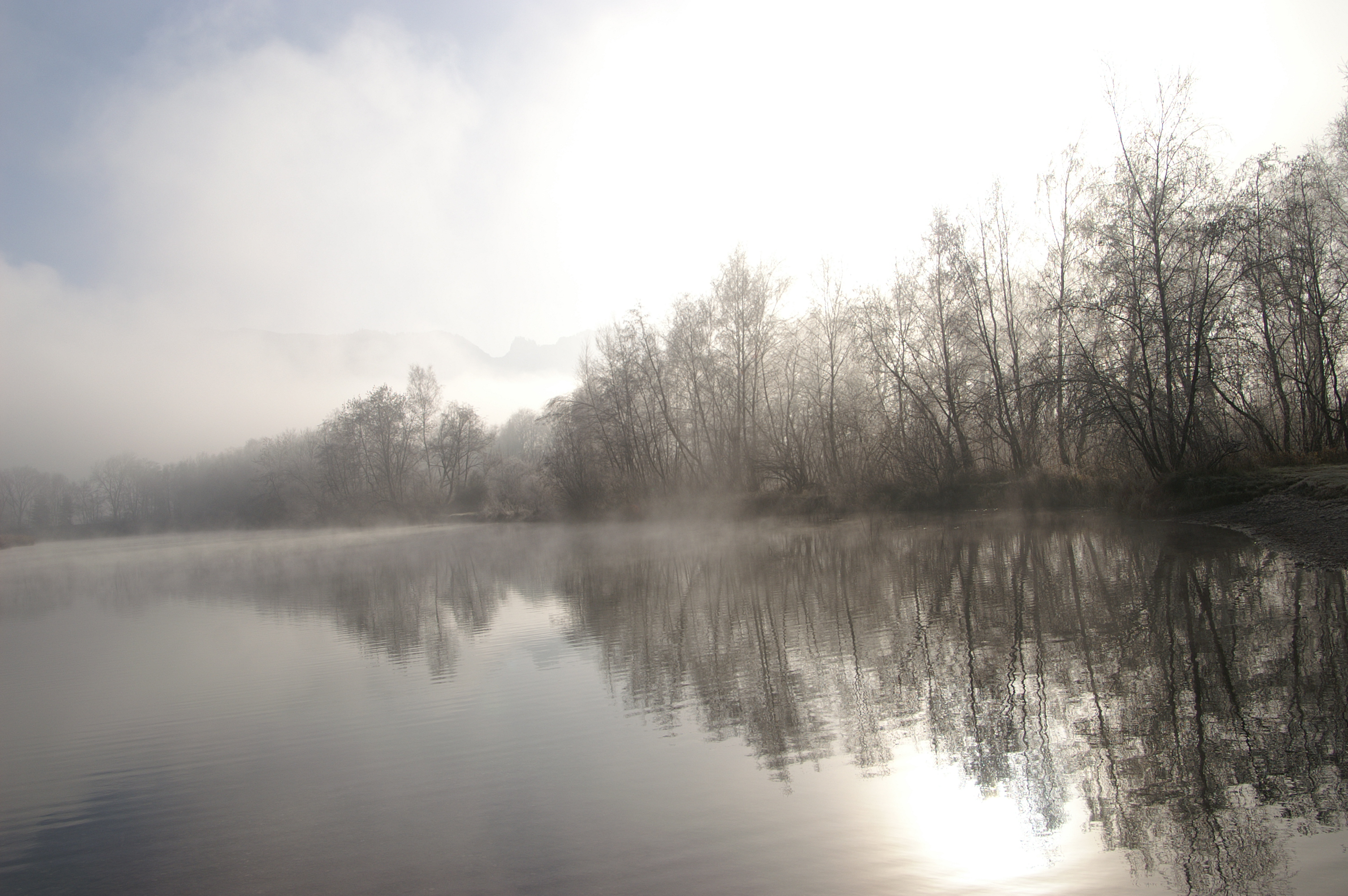 alter Rhein bei Hohenems